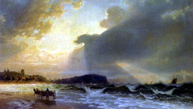 Gemälde Ostseestrand aus dem Jahr 1854 von Johann Wilhelm Cordes